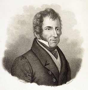 Andrea Vaccà Berlinghieri (1772 - 1826)